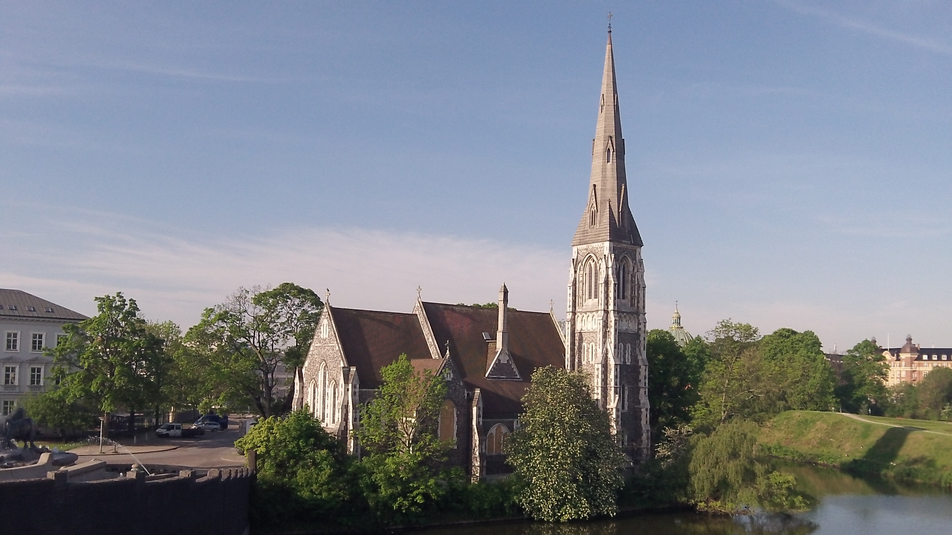 St Alban's English Church in Copenhagen, Denmark